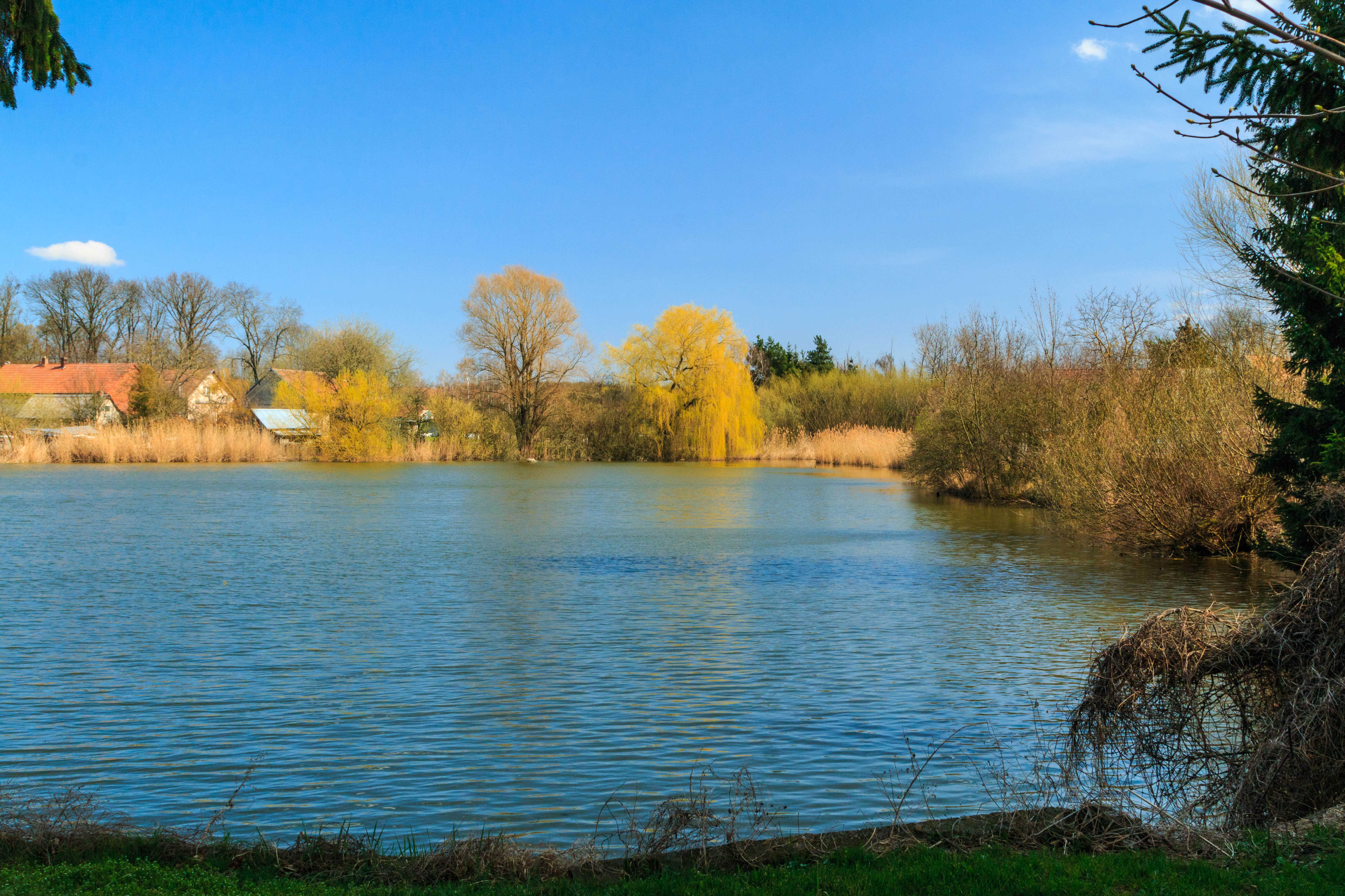 Rybník Tahounek v Barchově Project: Vodstvo.